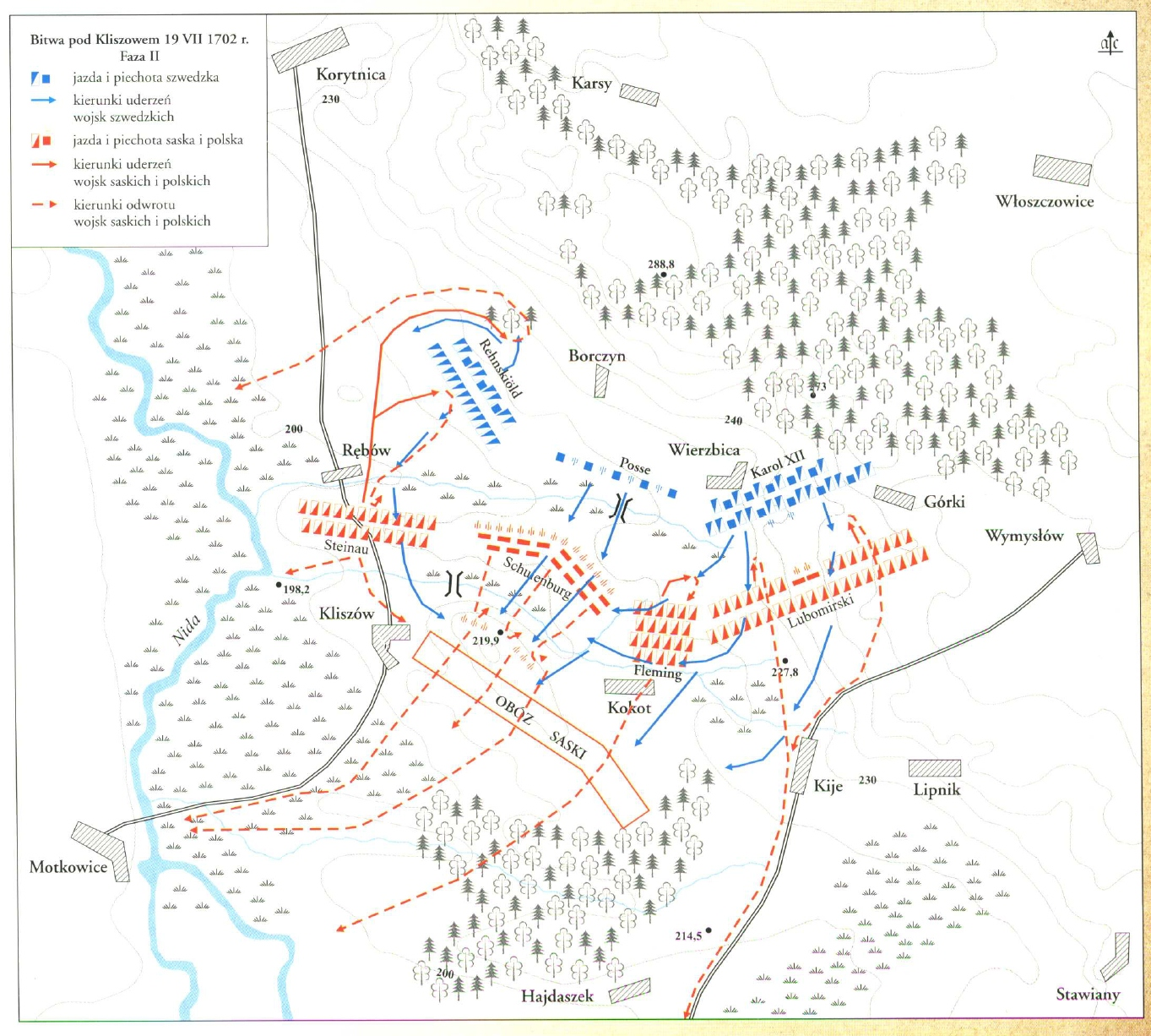 Slaget vid Kliszów, 1702